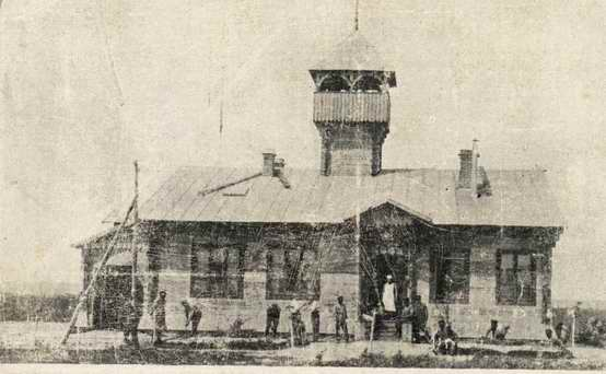 Mizocz. Strażnica plut. K.O.P. W Mizoczu była szkoła dla podoficerów niezawodowych w I Brygadzie przy 11 batalionie.